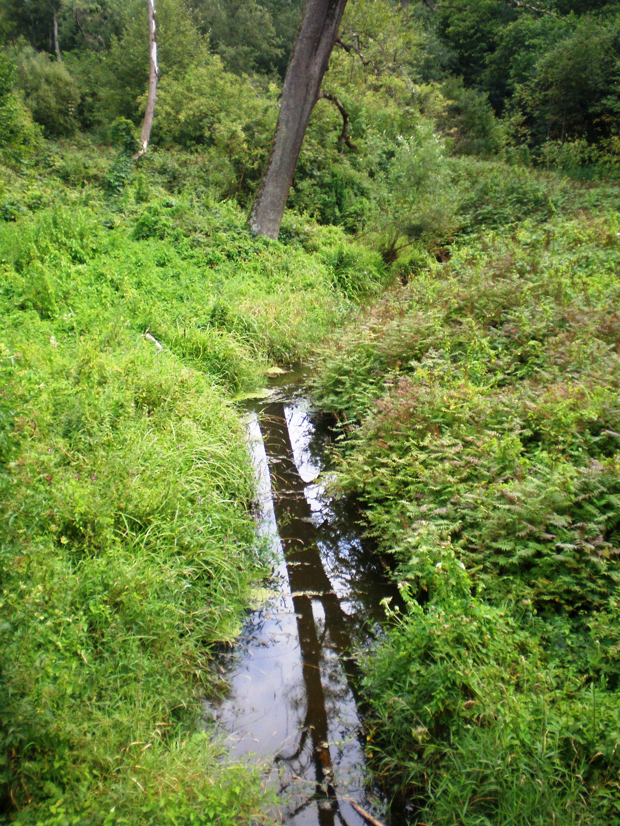 Alkupis prie Apytalaukio dvaro, Kėdainių raj.